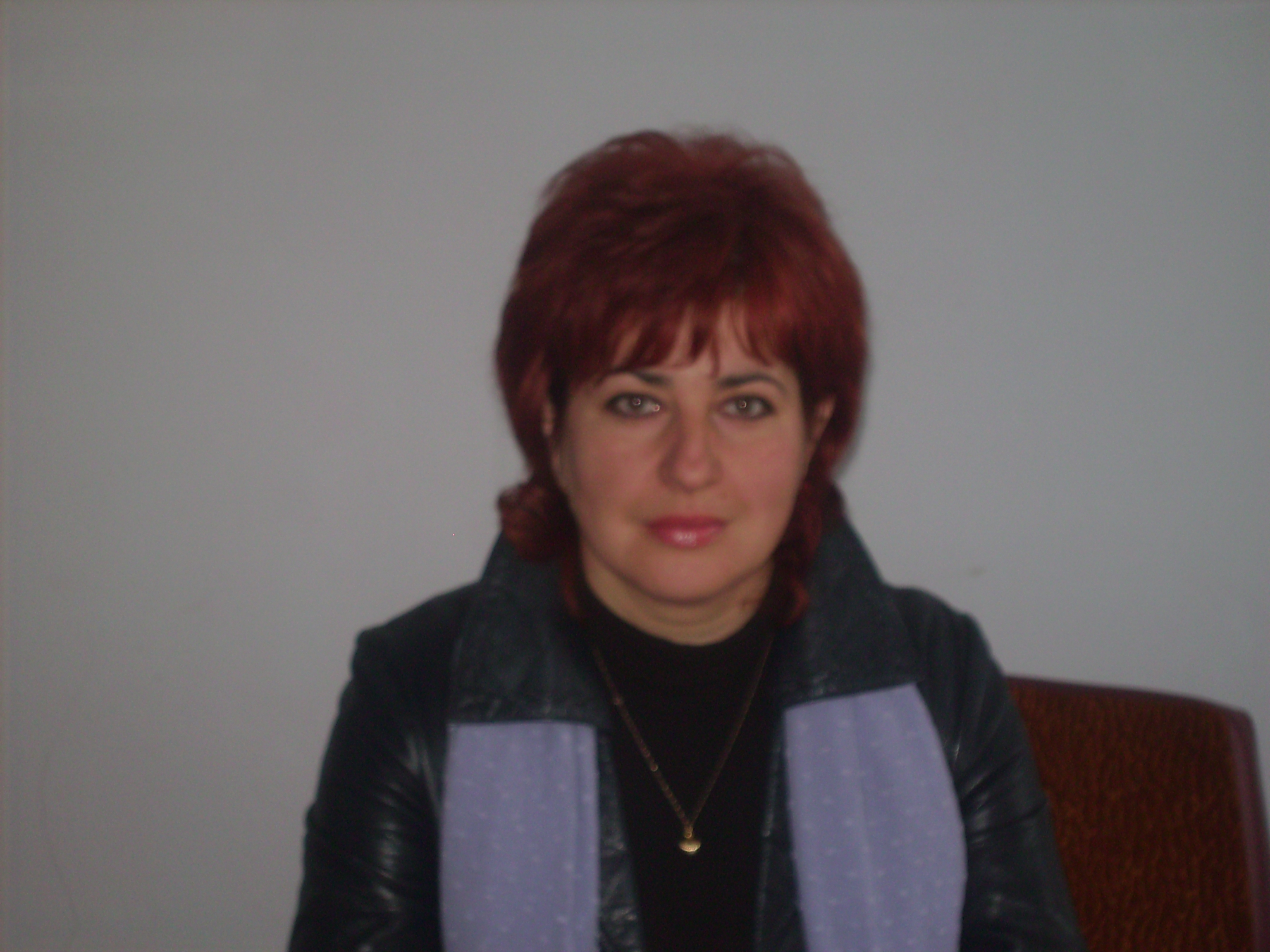 Ж.Голоюх, сільський голова